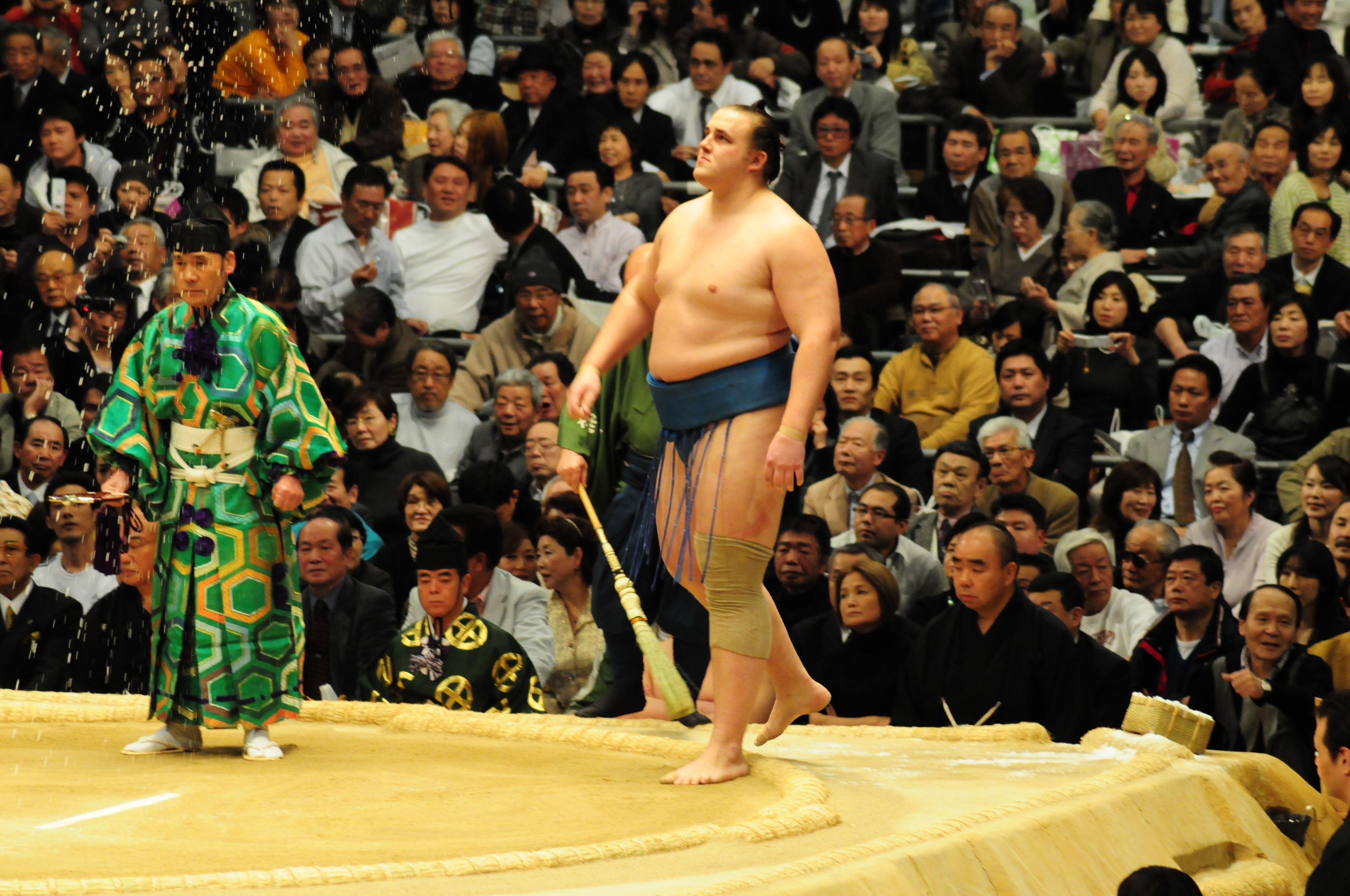 Mar 23, 2009 at 17:52, Osaka 大阪三月場所